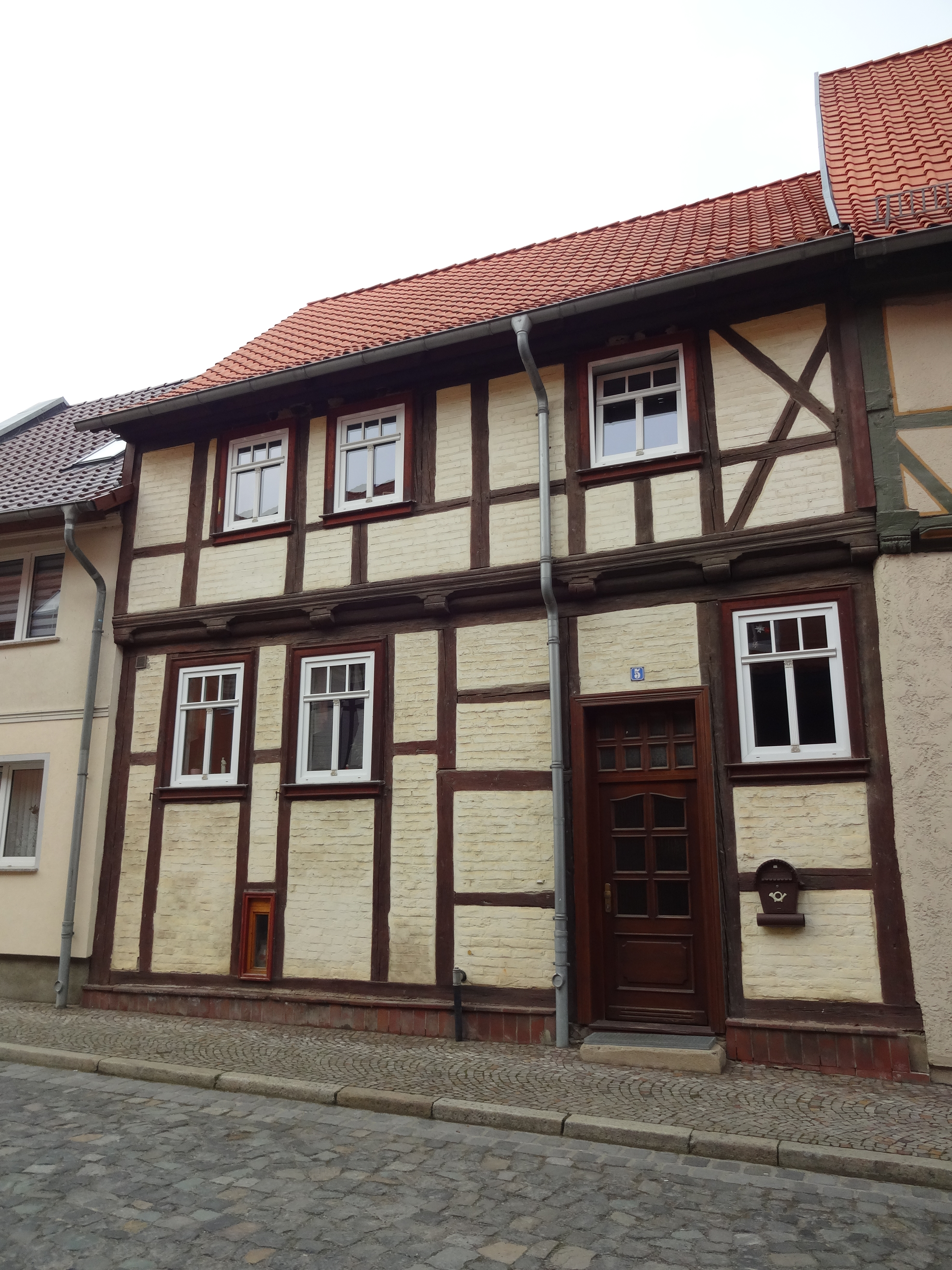 denkmalgeschütztes Fachwerkhaus in der Ueckerstraße 5 Derenburg, Ortsteil von Blankenburg (Harz)